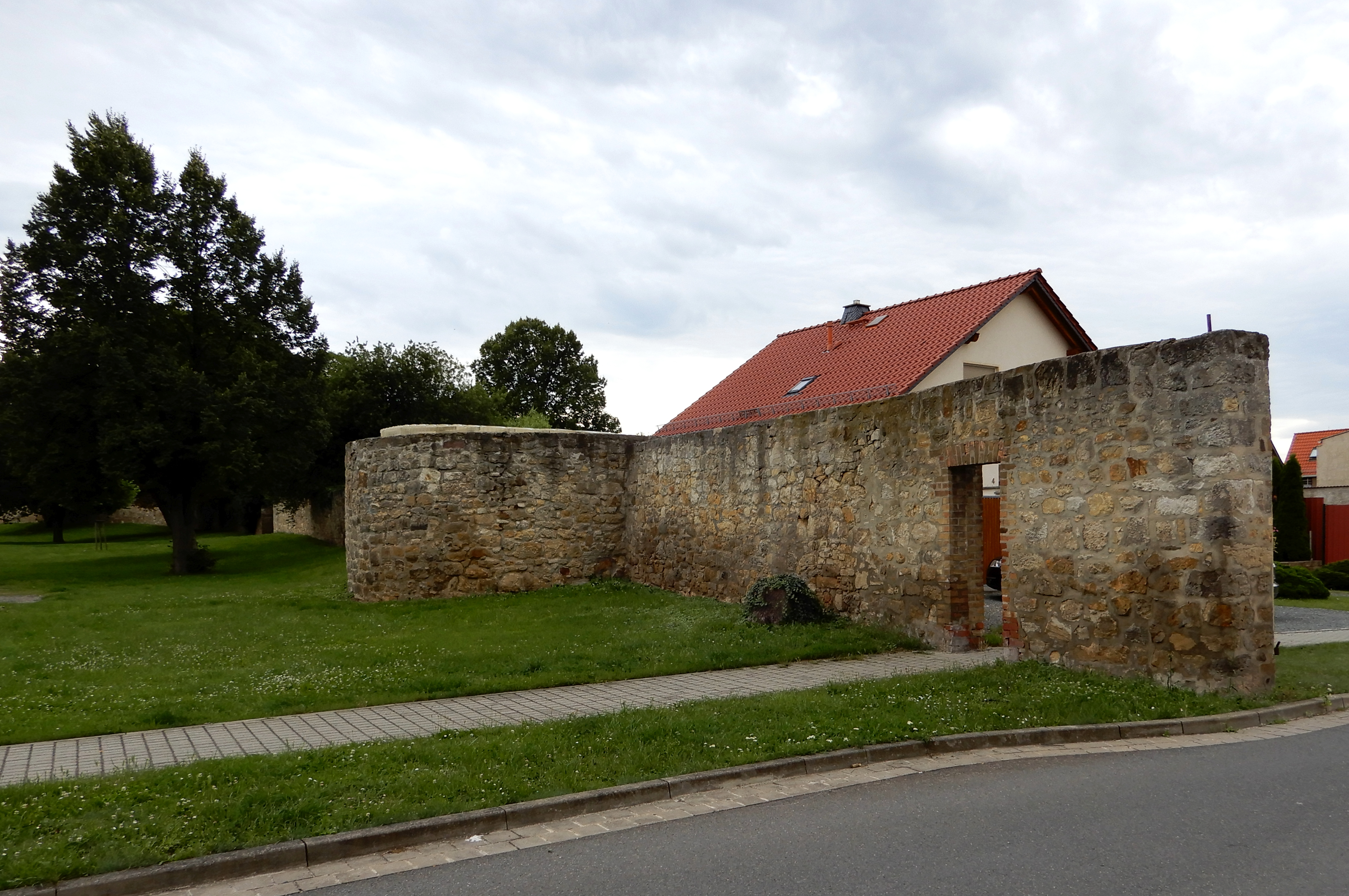 Stadtmauer in Ballenstedt